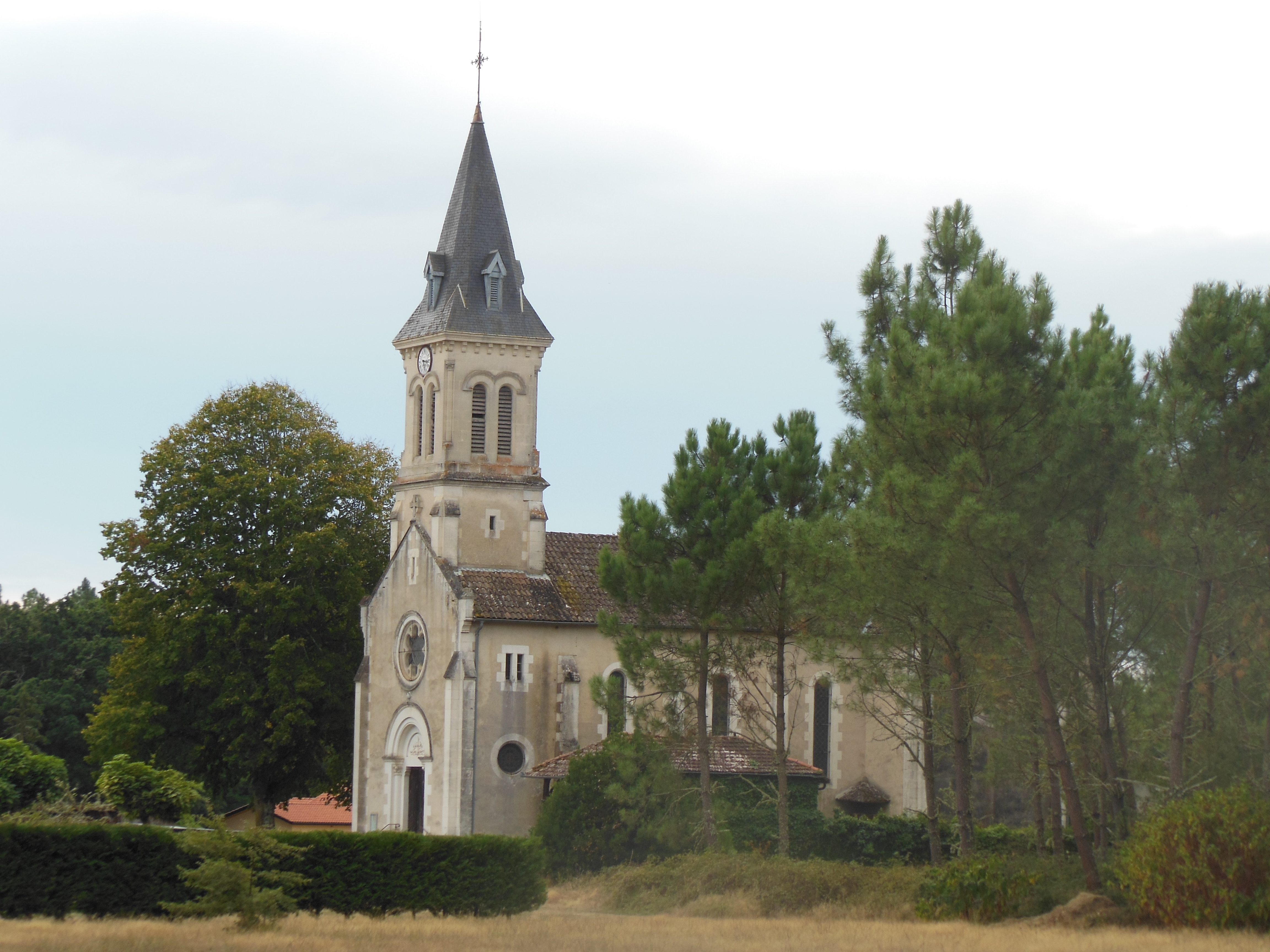 Eglise Saint-Clair d'Arue, dans le département français des Landes